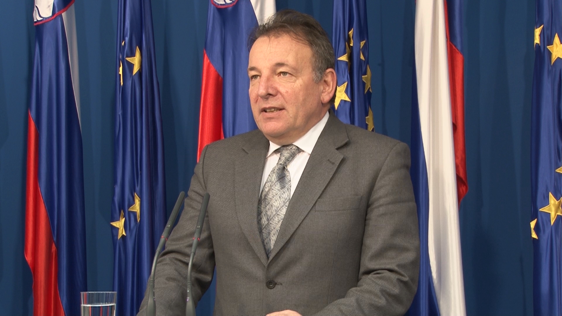 Na novinarski konferenci po 55. redni seji Vlade RS je sodeloval državni sekretar na Ministrstvu za finance Andrej Šircelj.